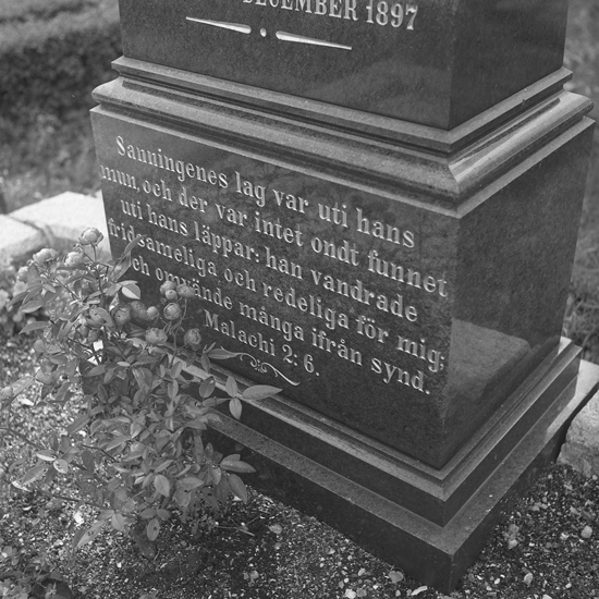 August Simson, tombstone, Käringön